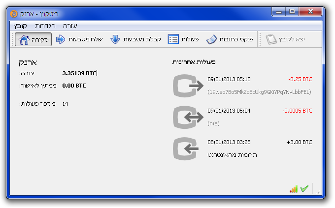 Bitcoin software running under Windows 7